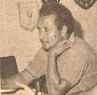 Ahmad Alyafai